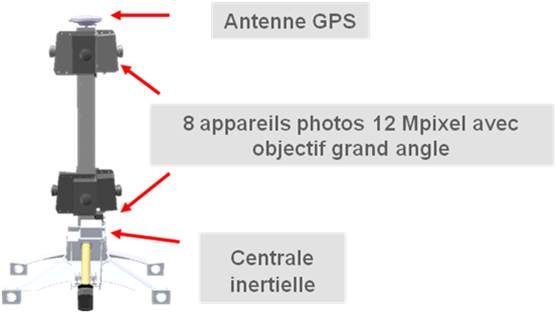 Carte collecte UrbanDive